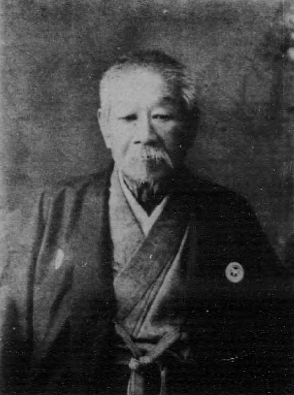 宇井可道肖像 81歳